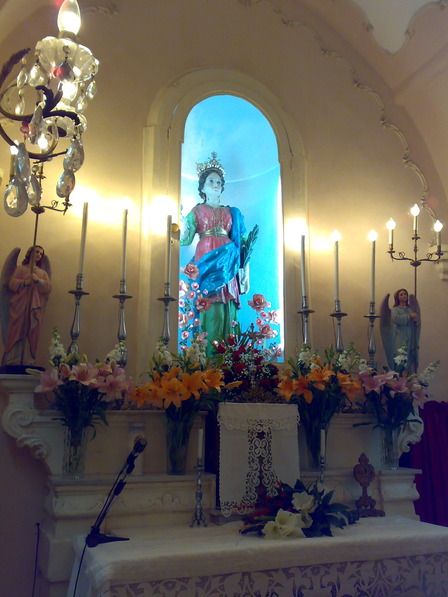 statua di Santa Lucia, omonima chiesa, Noicattaro (BA)